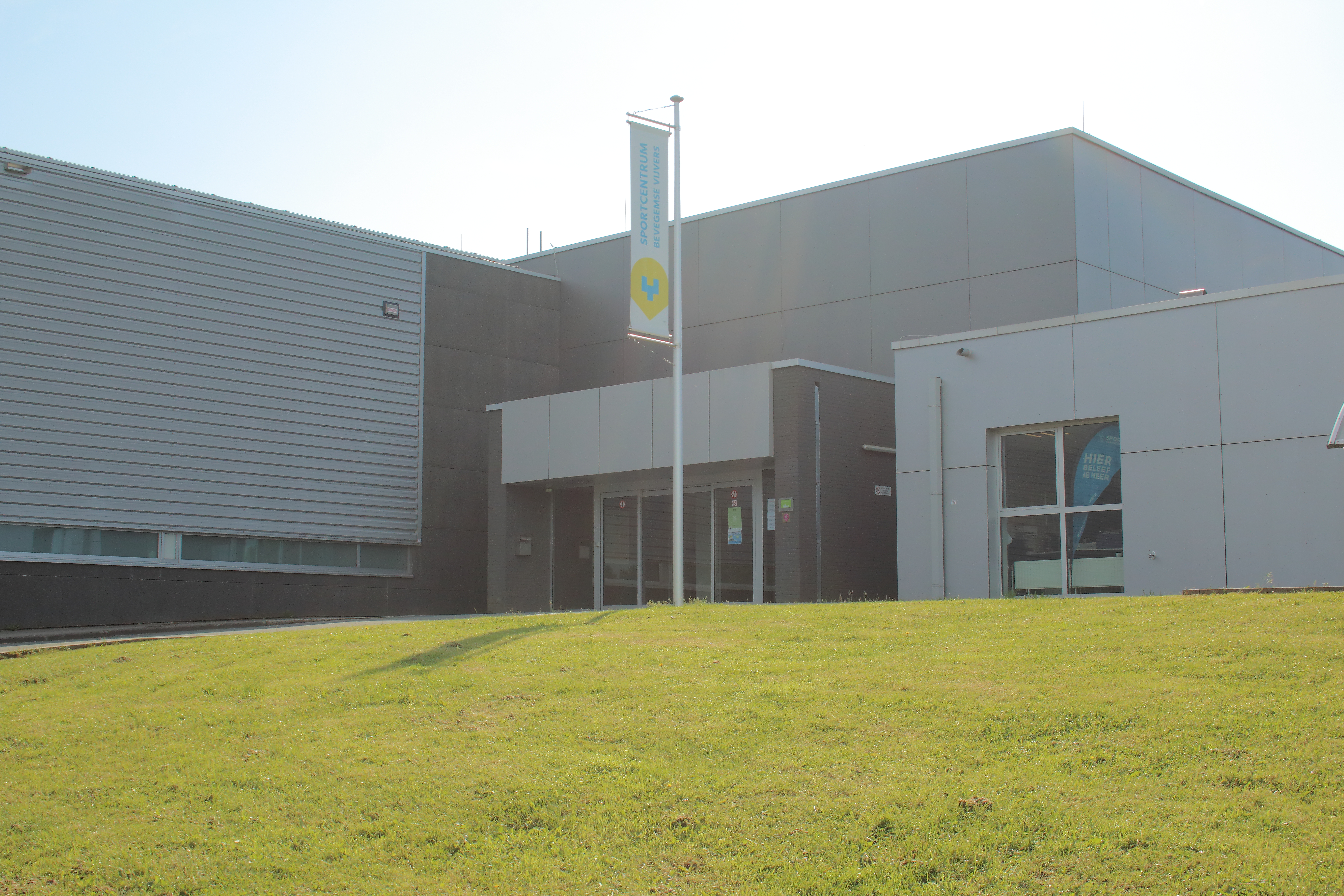 stedelijk sportcentrum 'Bevegemse Vijvers', Zottegem, Vlaanderen, België